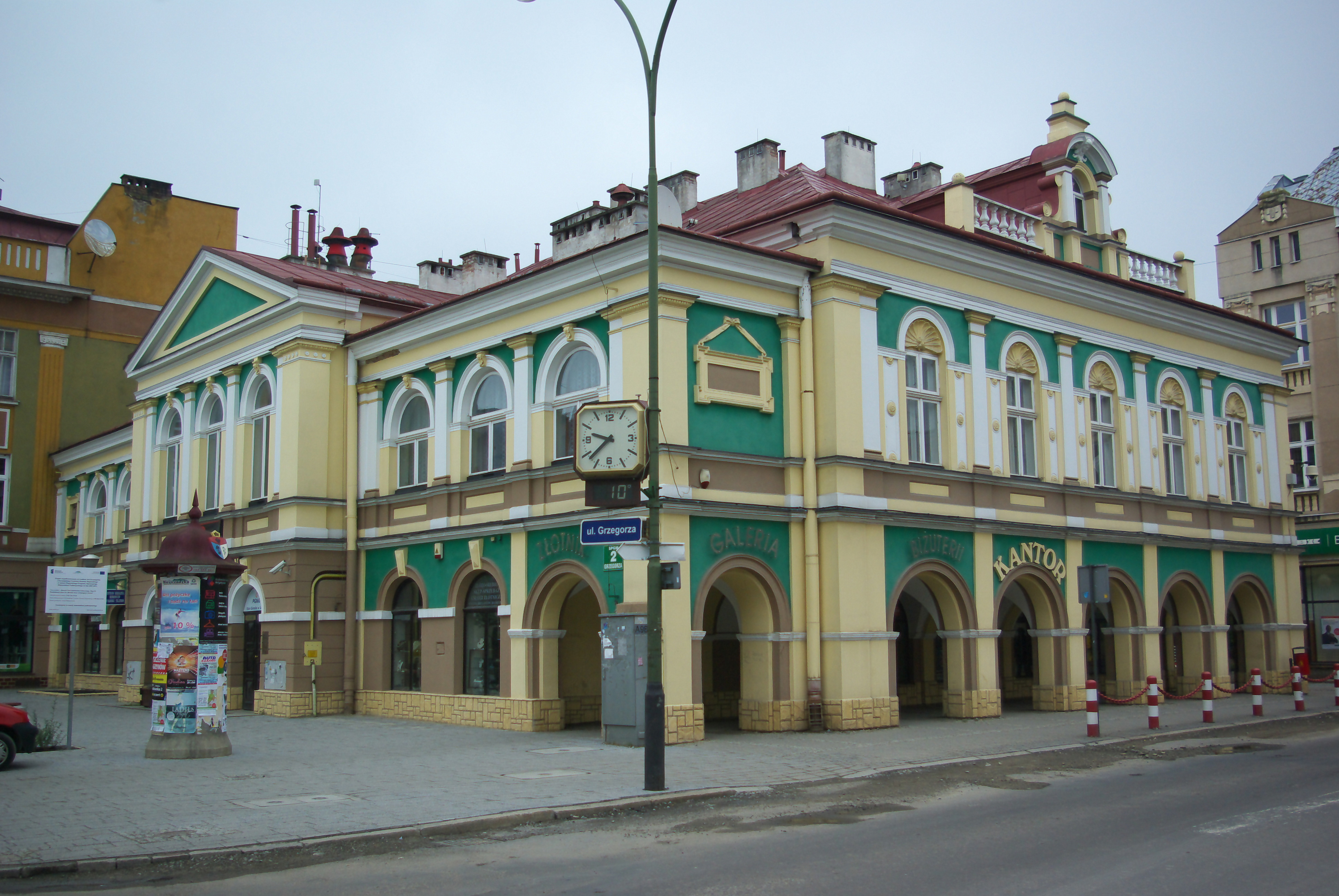 Ramerówka w Sanoku 2013